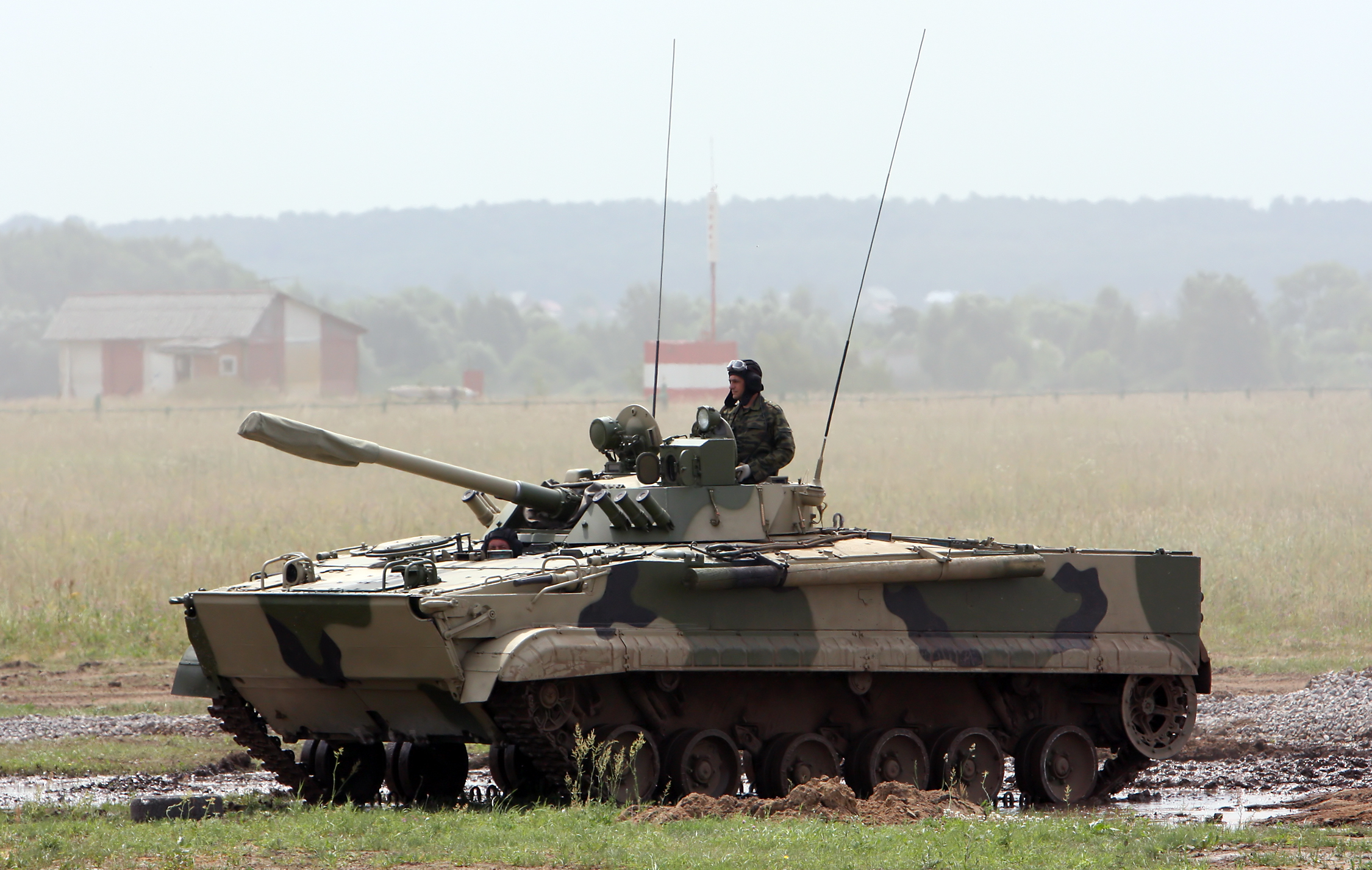 БМП-3